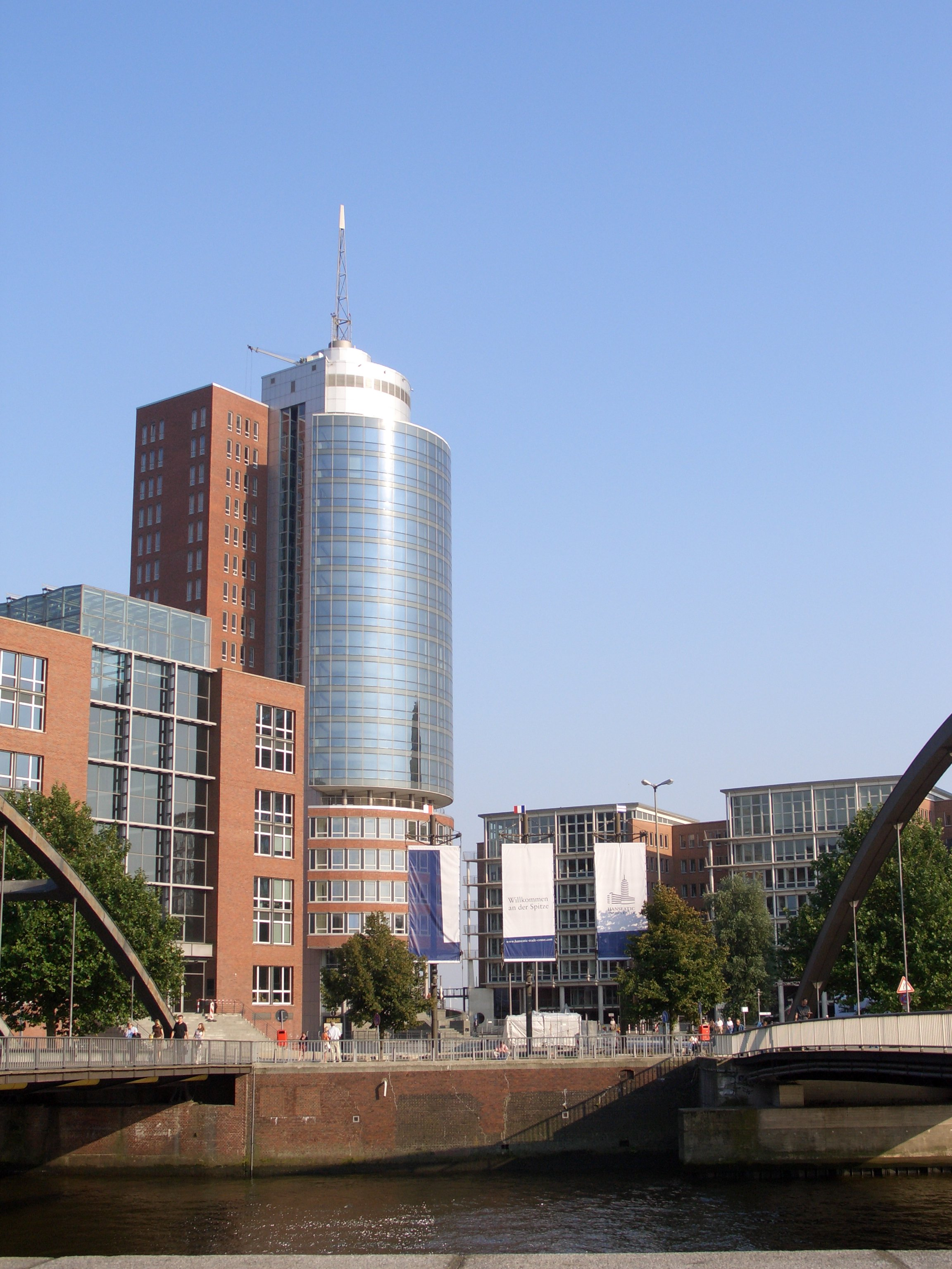 Das Hanseatic Trade Center (grosser Turm), aufgenommen zwischen der Niederbaumbrücke die links und rechts im Bild zu sehen ist.